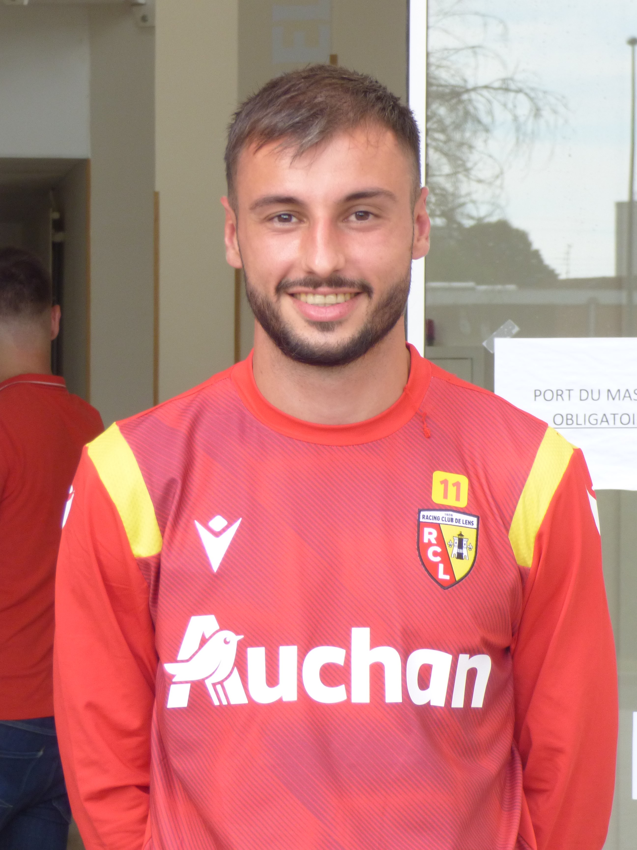 Jonathan Clauss lors d'un entraînement du Racing Club de Lens, le 15 juillet 2020, au centre technique et sportif de La Gaillette